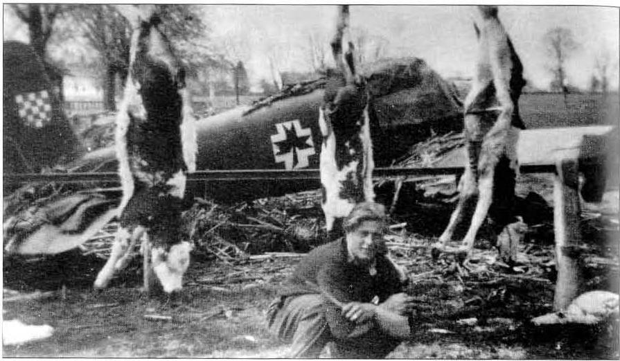 uništeni zrakoplov ZNDH, 1944. [Fiat G.50 ?]